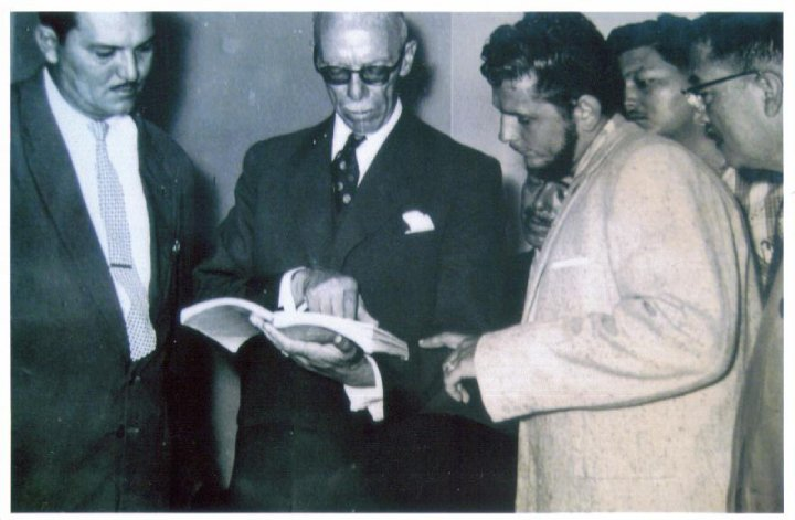 Sr. Humberto Centanaro Gando Ex-Alcalde de Milagro junto a Jose Maria Velasco Ibarra Ex-Presidente del Ecuador